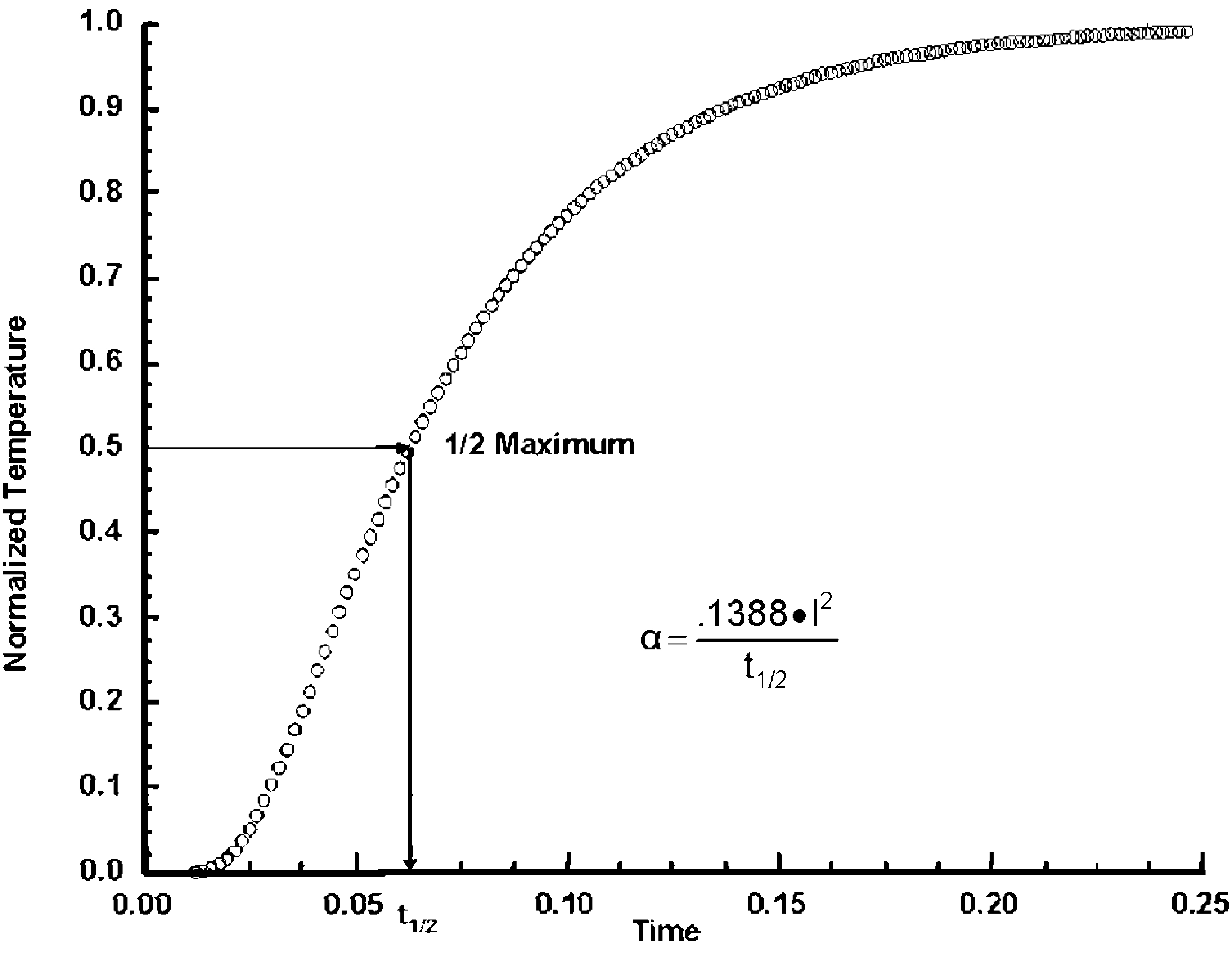 Theoretical prediction of back-surface temperature rise